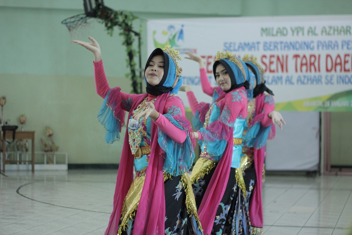 Ekstrakulikuler Tari SMA Islam Al Azhar 14 Semarang dalam Lomba Unjuk Kreasi Al Azhar (UKA) Se-Indonesia pada Tahun 2017.